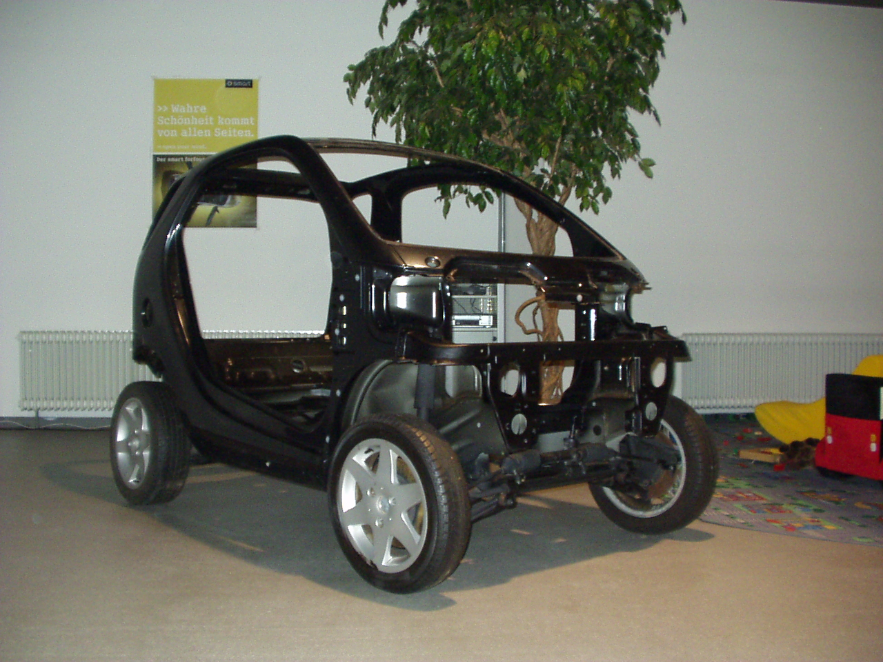 Rohkarosse des Smart